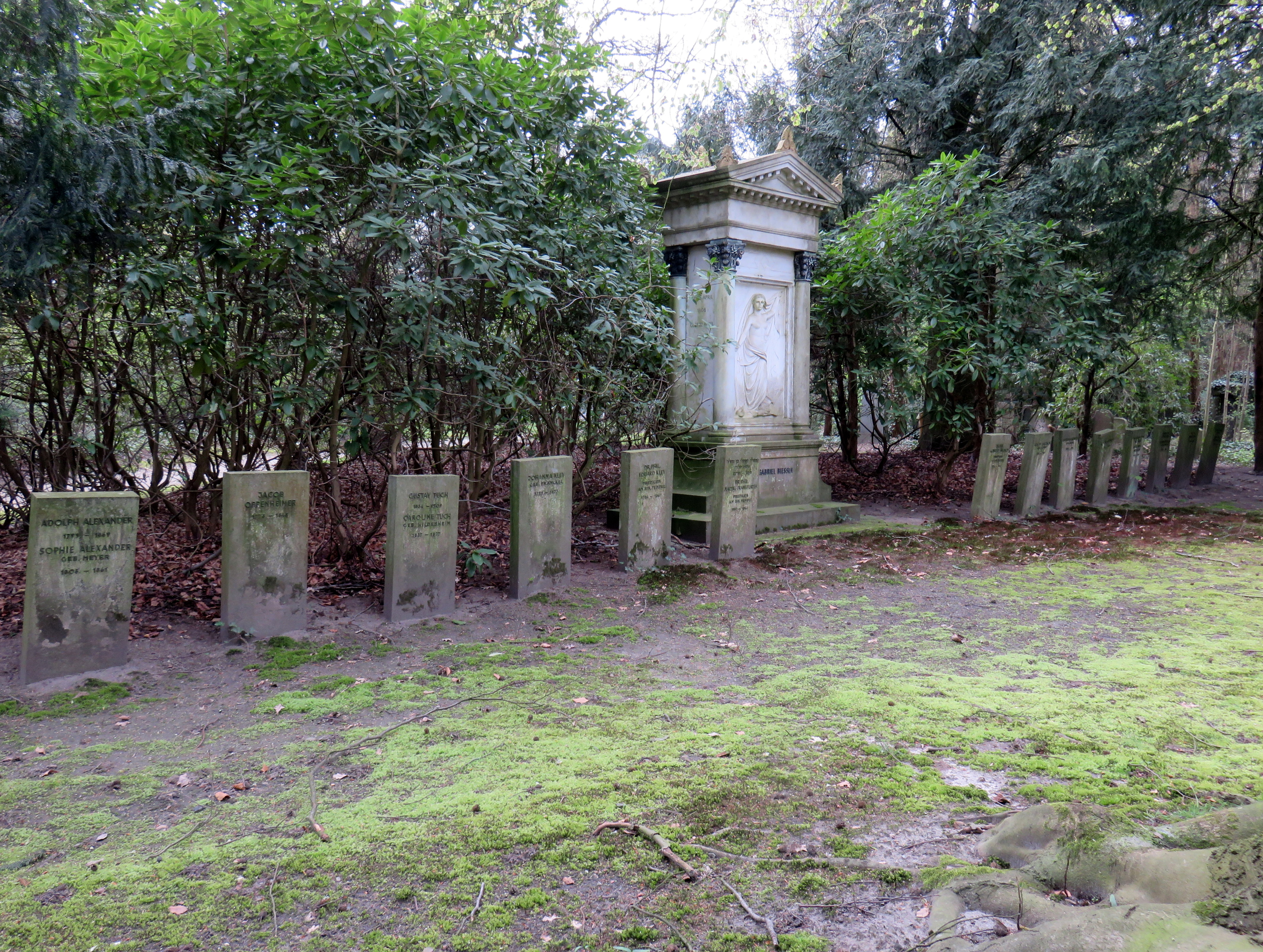 Gedenkstein für den deutschen Kaufmann Gustav Tuch in der Ehrenanlage im Bereich „Grindelfriedhof“ auf dem Jüdischen Friedhof Ohlsdorf.